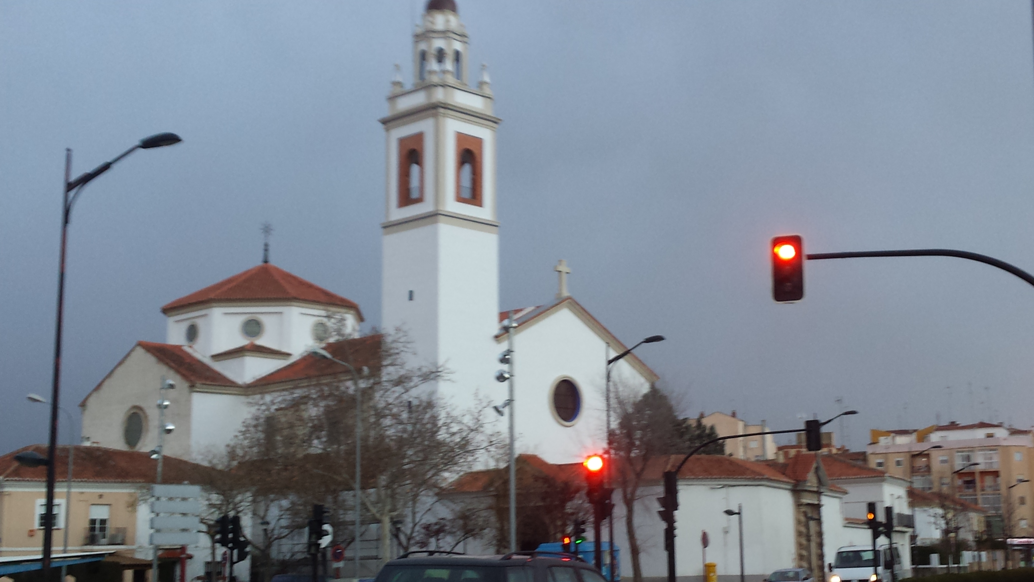 Iglesia de Fátima. Albacete